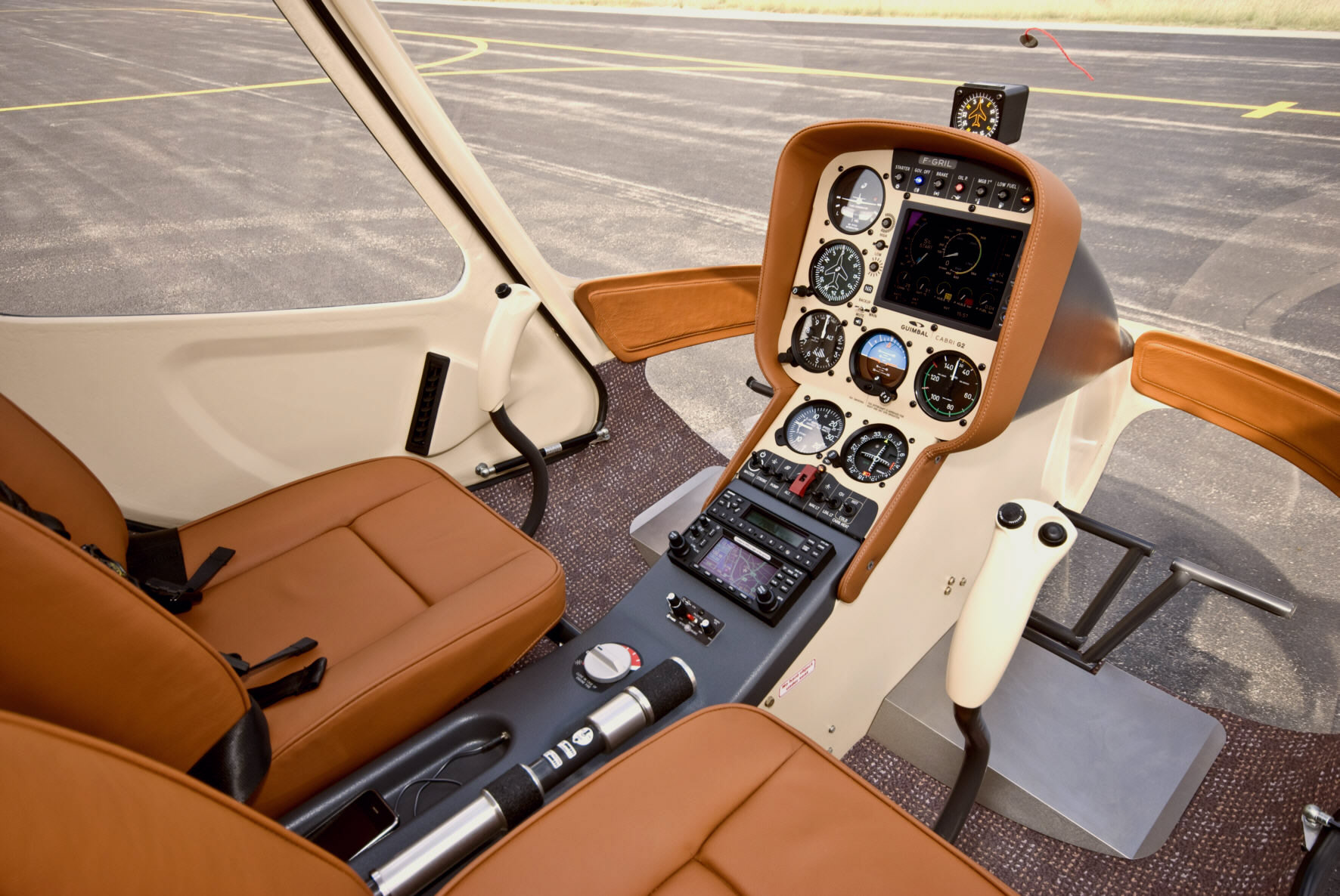 Cockpit de l'hélicoptère Cabri G2 N°1006